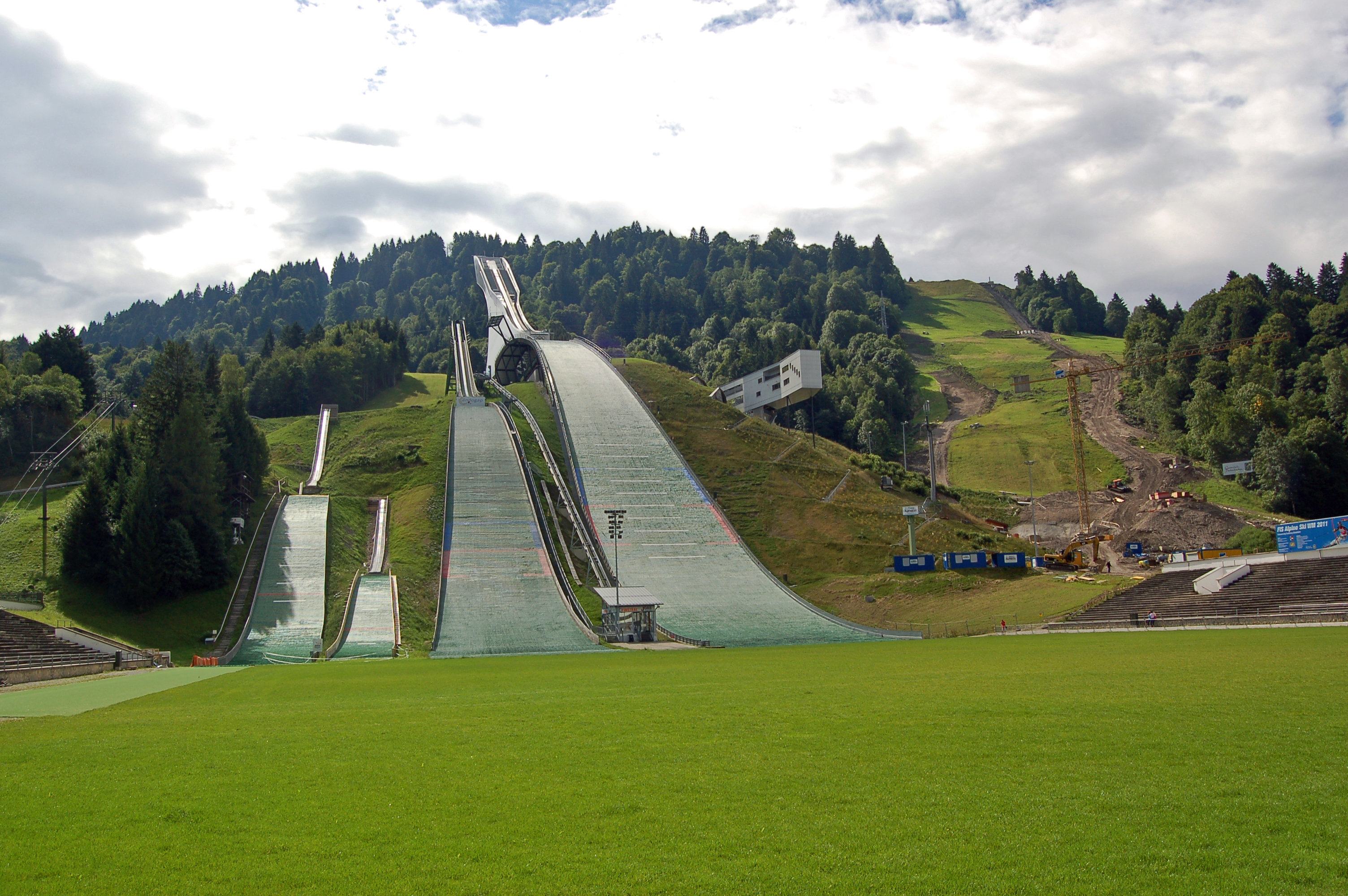 Bereits 1923 entstand die erste Olympia-Schanze am Gudiberg. Und das, obwohl die Olympischen Winterspiele dem Ort erst für 1936 zugesprochen wurden. Weil die steilen Hänge des Berges für das Anlaufprofil nicht ausreichten, wurde ein künstlicher Anlaufturm von 43 Metern Höhe und 5 Metern Breite errichtet. Im Laufe der Jahre wurde die Schanze immer wieder modernisiert. 2007 wich sie dann einem komplett neuen Bau mit einem Anlaufturm von 100 Metern Länge. Oben angelangt, befindet man sich heute freischwebend, 62 Meter über dem Gelände, was der Anlage den Spitznamen »Olympischer Freischwinger« eintrug. Im Winter verschmilzt die neue Schanze tagsüber dank ihrer transluzenten Verkleidung mit der sie umgebenden Schneelandschaft. Abends wird der von innen erleuchtete Anlaufturm zur faszinierenden Lichtskulptur. Das neue Wahrzeichen wurde schon mit dem BDA-Preis Bayern vom Bund Deutscher Architekten und dem IOC/IAKS-Award ausgezeichnet.